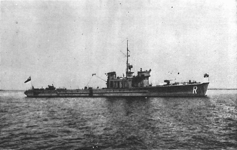 Trałowiec ORP "Rybitwa" na początku służby.